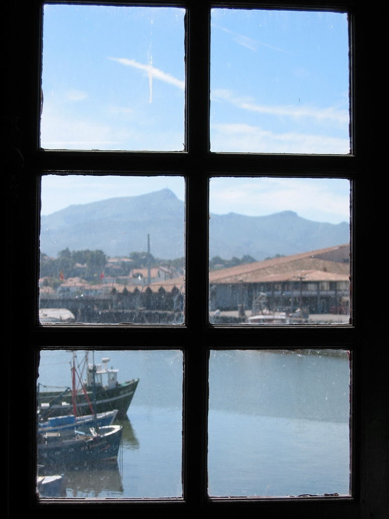 La Rhune, prise de la Maison de l'Infante à St Jean de Luz le 14/09/04 par Harrieta171